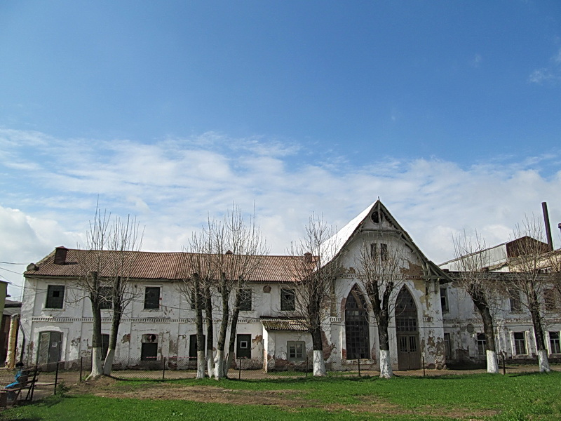 Альба. Спіртзавод. Вытворчы корпус